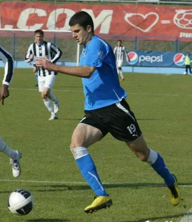 Vlad Rusu